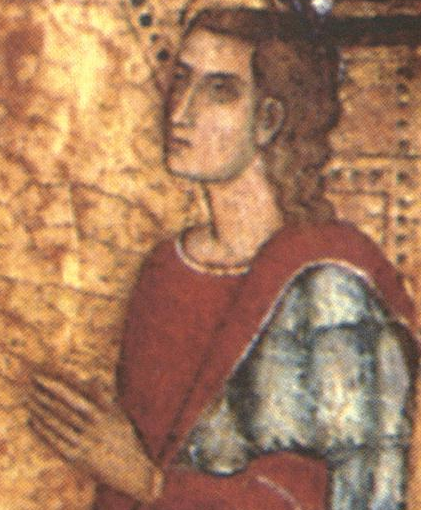 Particolare del polittico di Ottana (nell ex cattedrale)